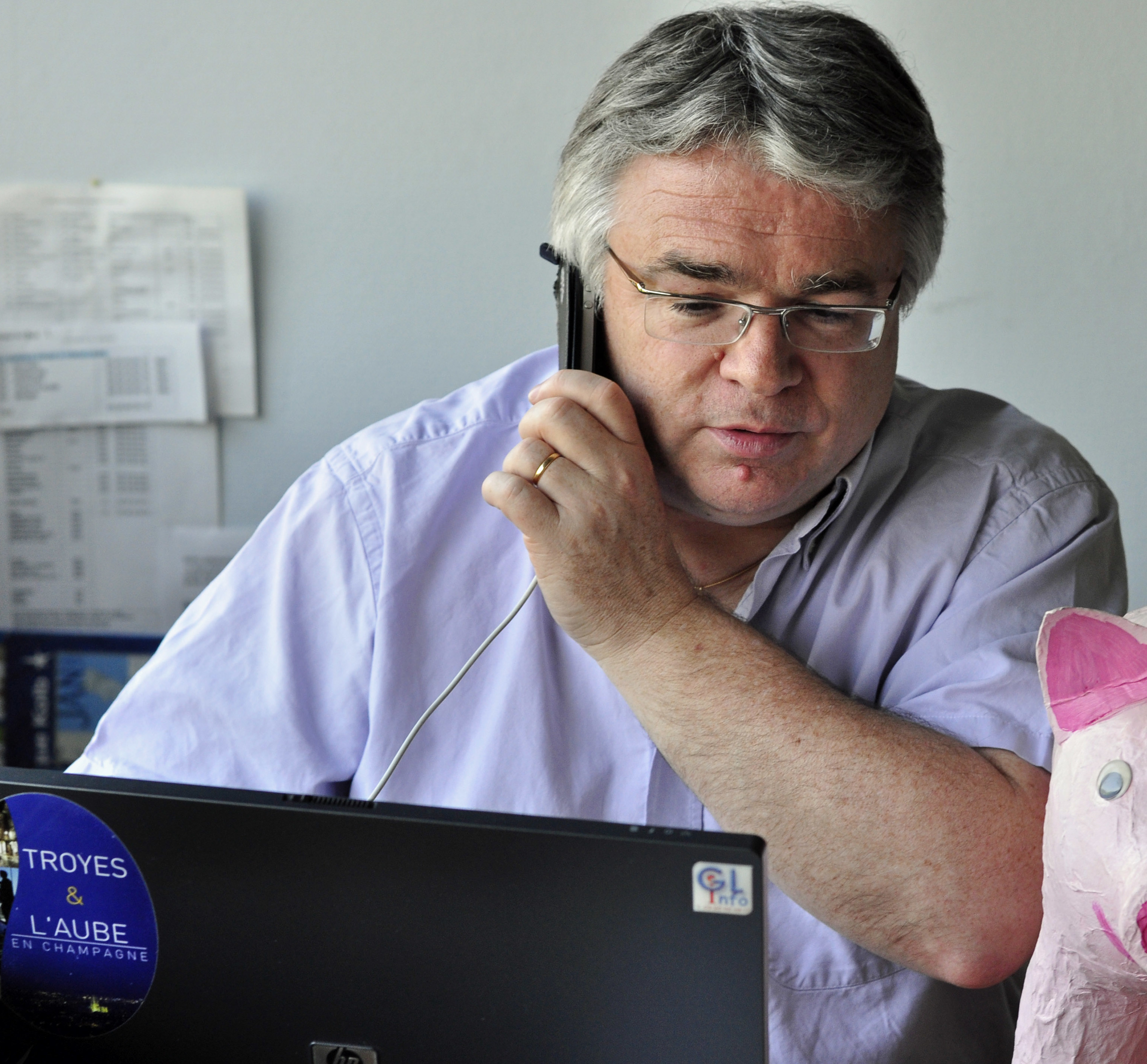 Dominique Lemelle, qui dirige avec son frère Benoît l'entreprise Gilbert Lemelle et un groupe charcutier, dans son bureau, sur le site de fabrication de Troyes Les Écrevolles. Troisième génération de charcutiers, notamment spécialistes de l'andoullette de Troyes.